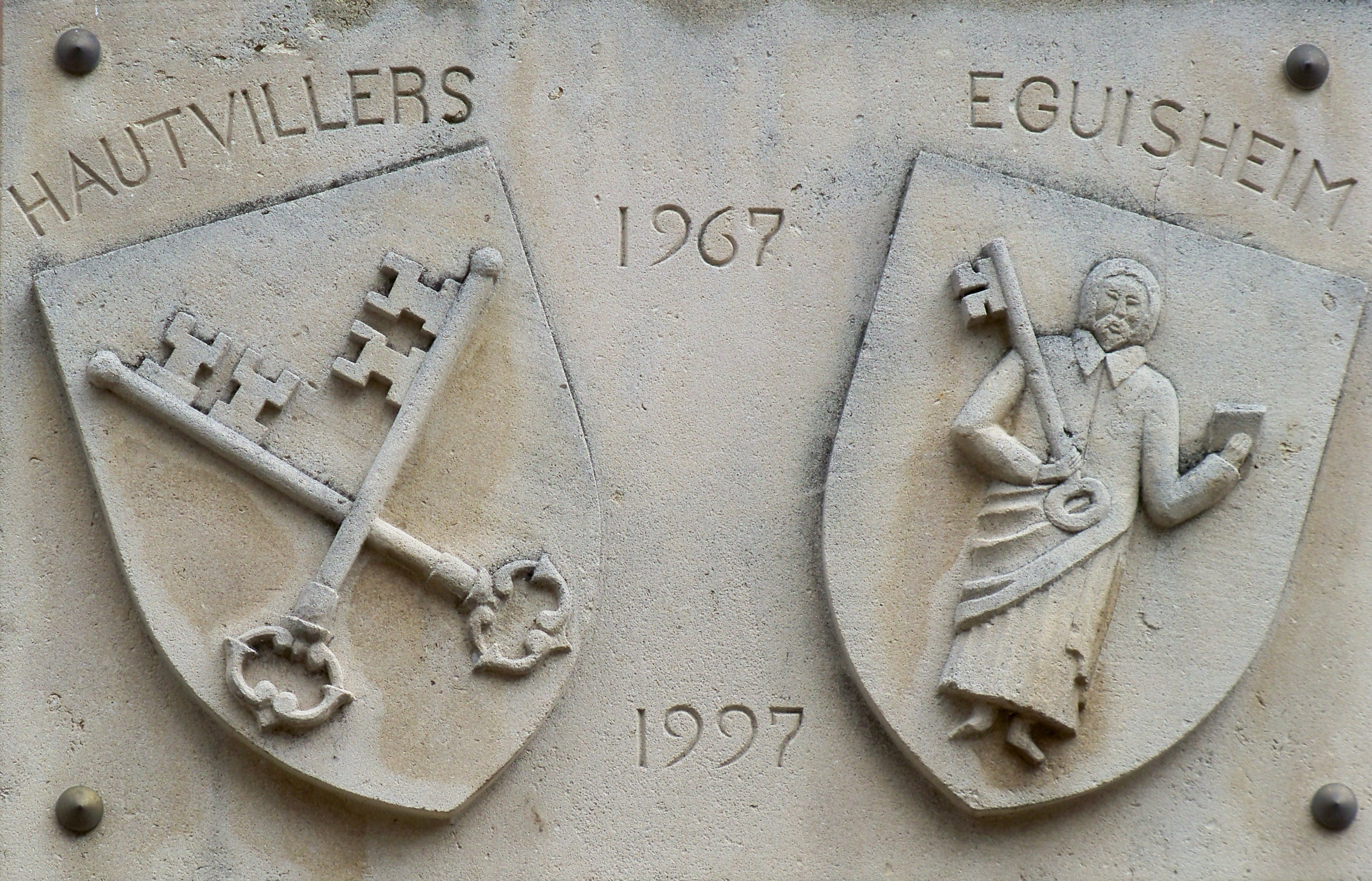 Blason des villes d'Hautevillers et Eguisheim